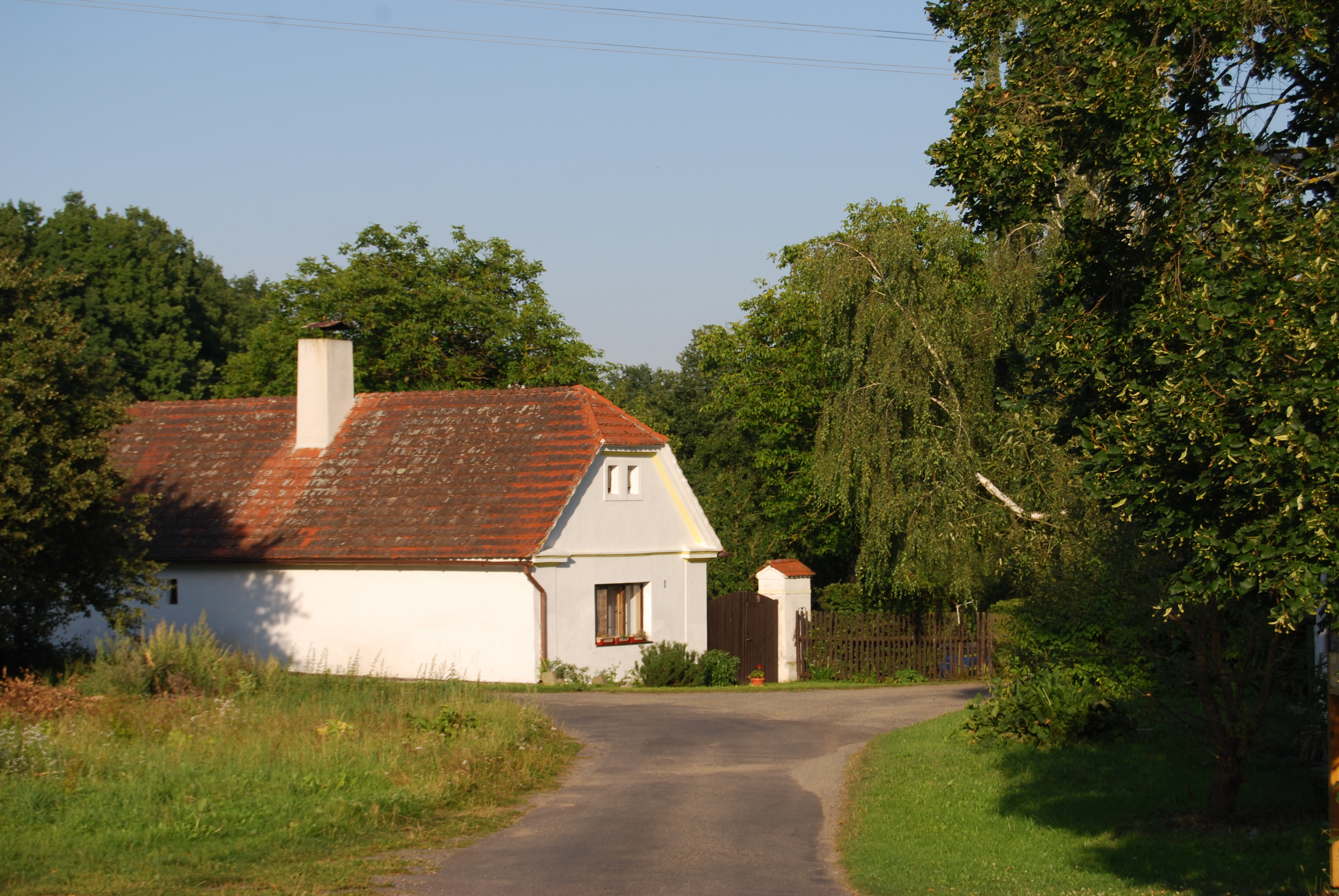 Usedlost v obci. Pukňov je část obce Lety v okrese Písek. Česká republika.